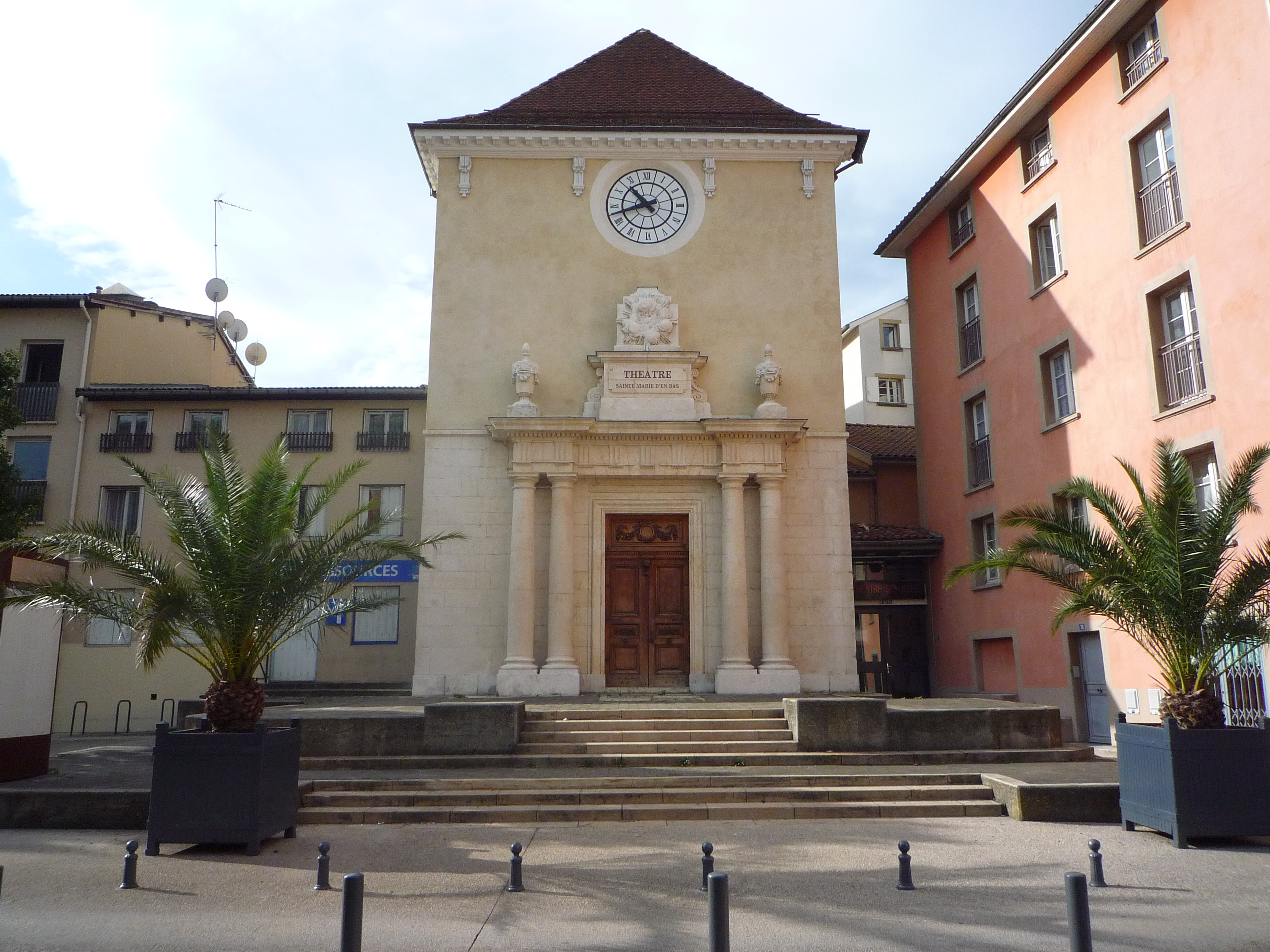 Théâtre Sainte Marie d'en bas (1647) - Grenoble